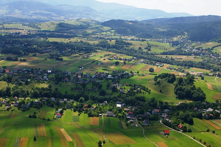 Widok z lotu ptaka - Lipowa